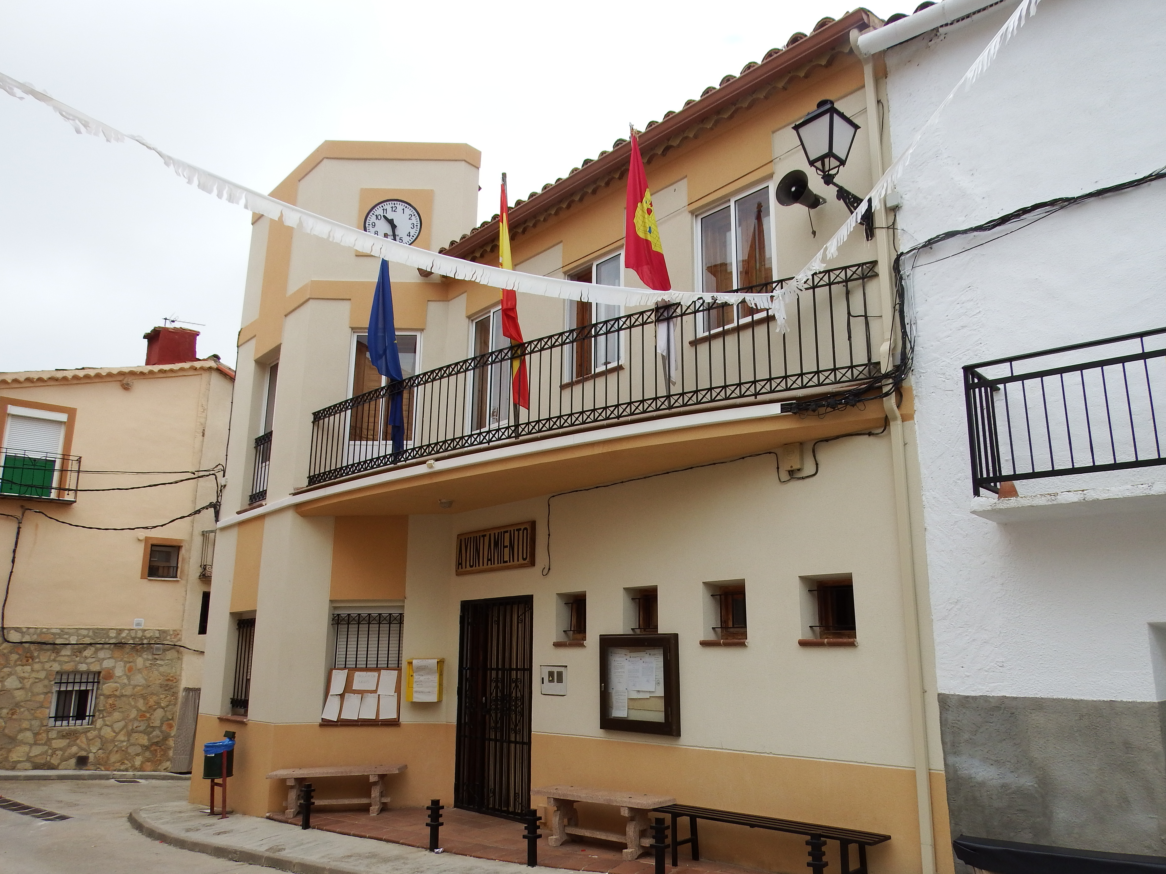 Valdemorillo de la Sierra, Ayuntamiento.